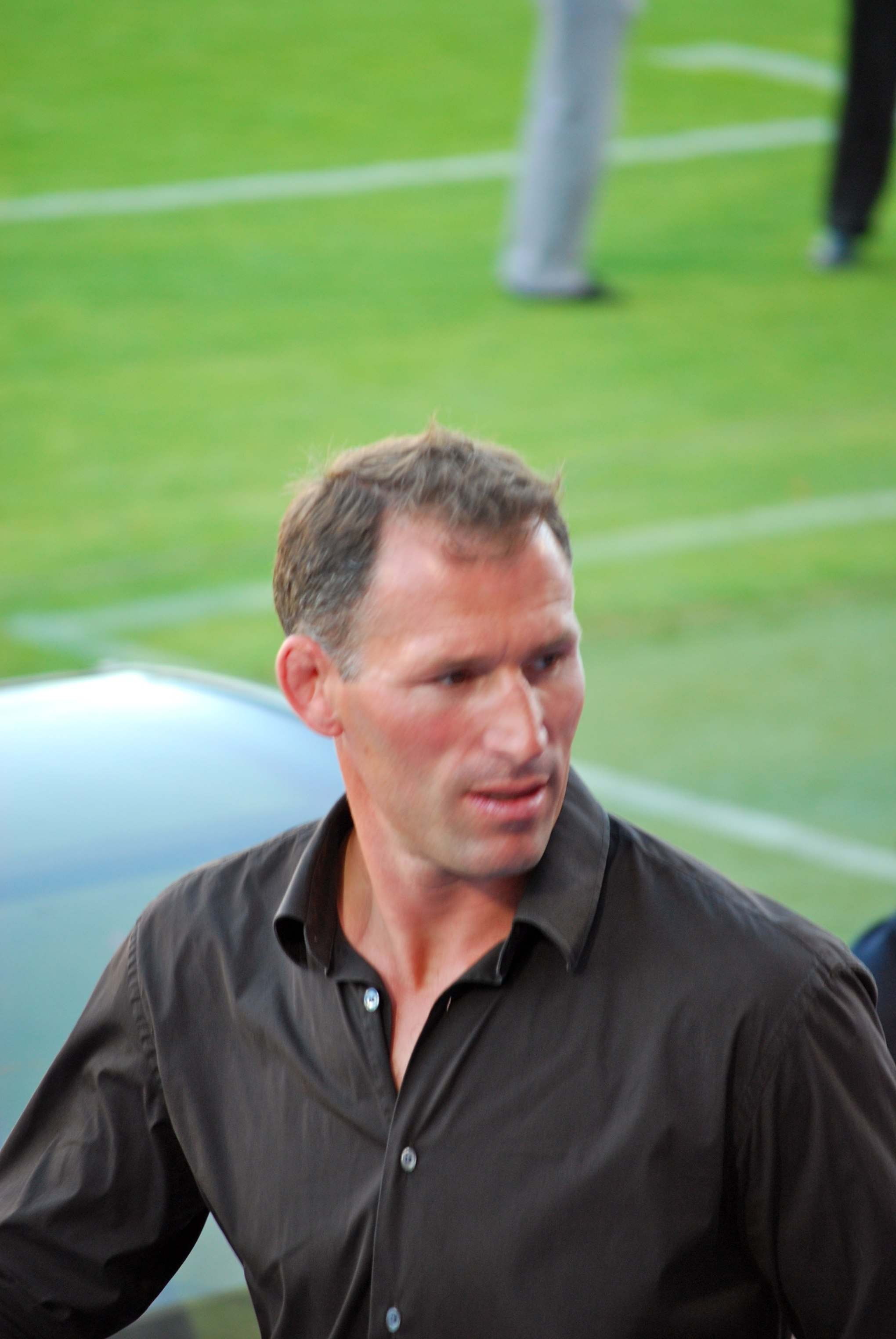 Olivier Magne lors de la demi-finale de top 14 2008-2009 opposant Clermont à Toulouse